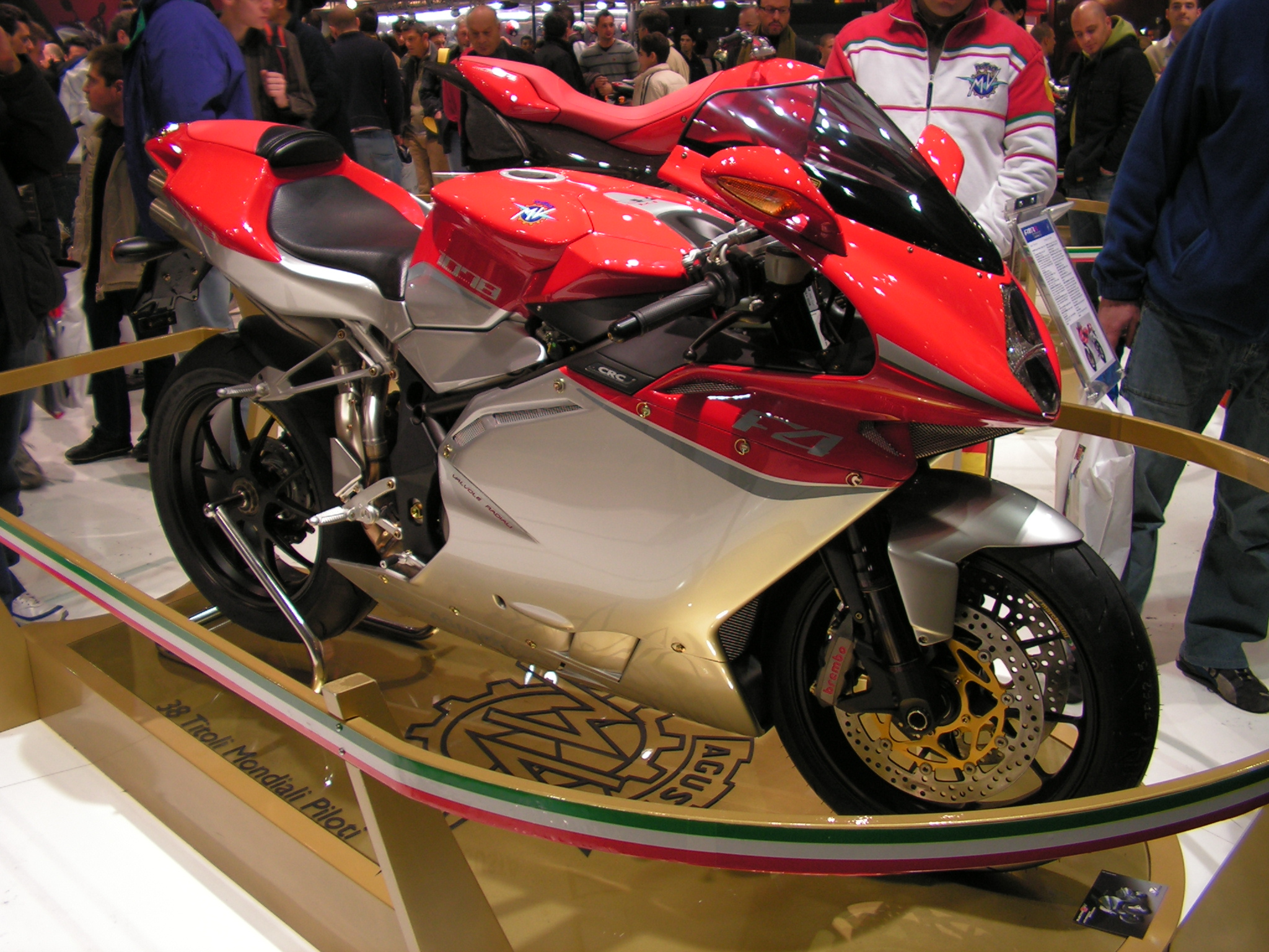 MV Agusta F4 1078 - EICMA 2007, Milan (Italy)